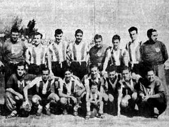 Equipo de Unión de Santa Fe que formo en 1949